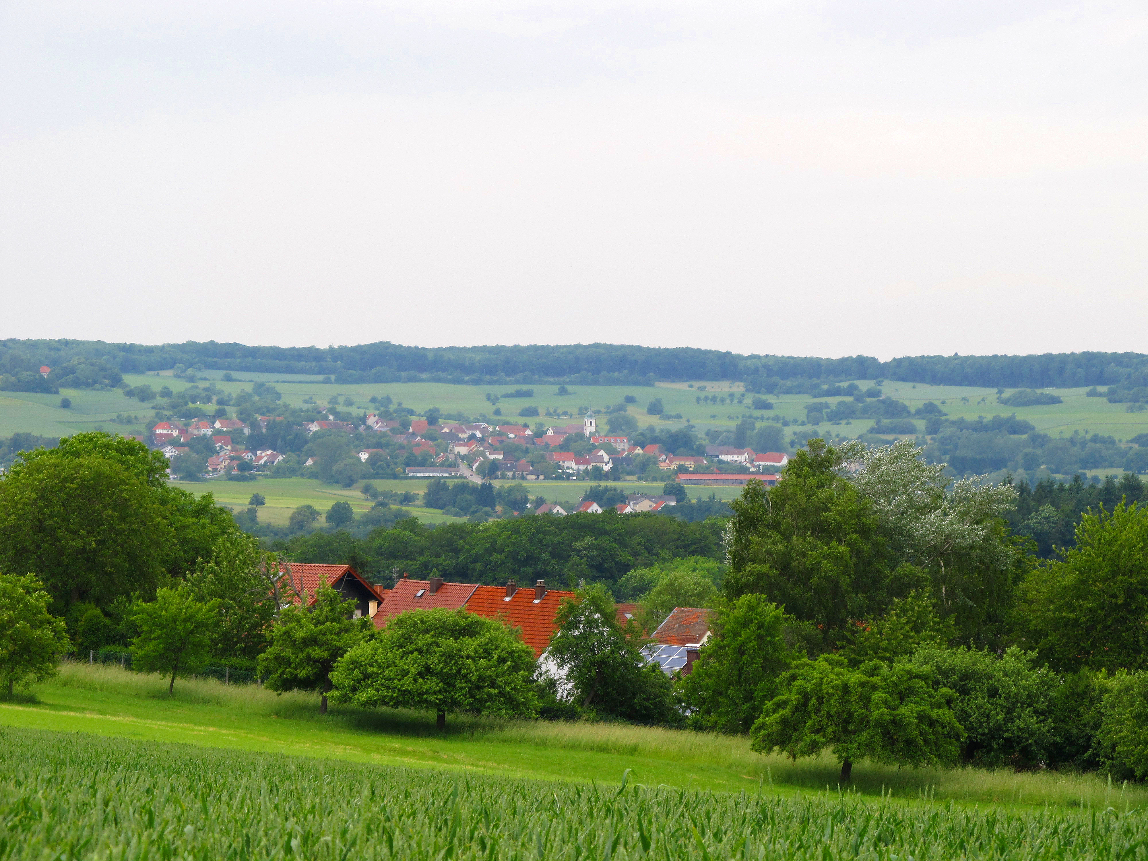 Blick auf Medelsheim, Gemeinde Gersheim, Saarpfalz-Kreis, Saarland